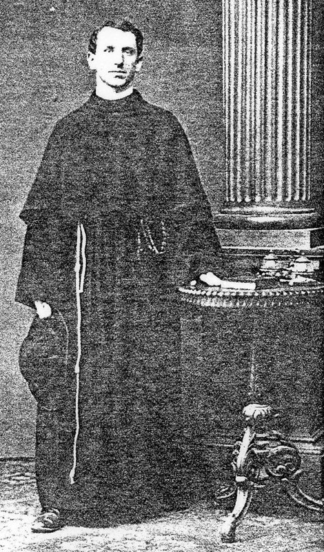 Baron Constantin August Maria von Droste zu Hülshoff, deutscher Franziskanerminorit, Missionar in USA (+ 1901)